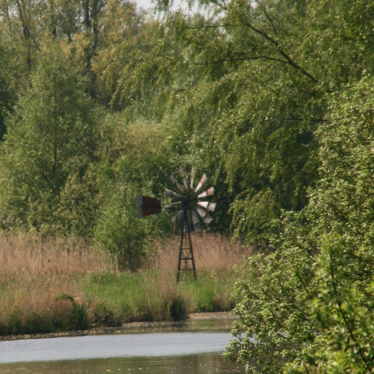 Nijetrijne: Windmotor nr 2